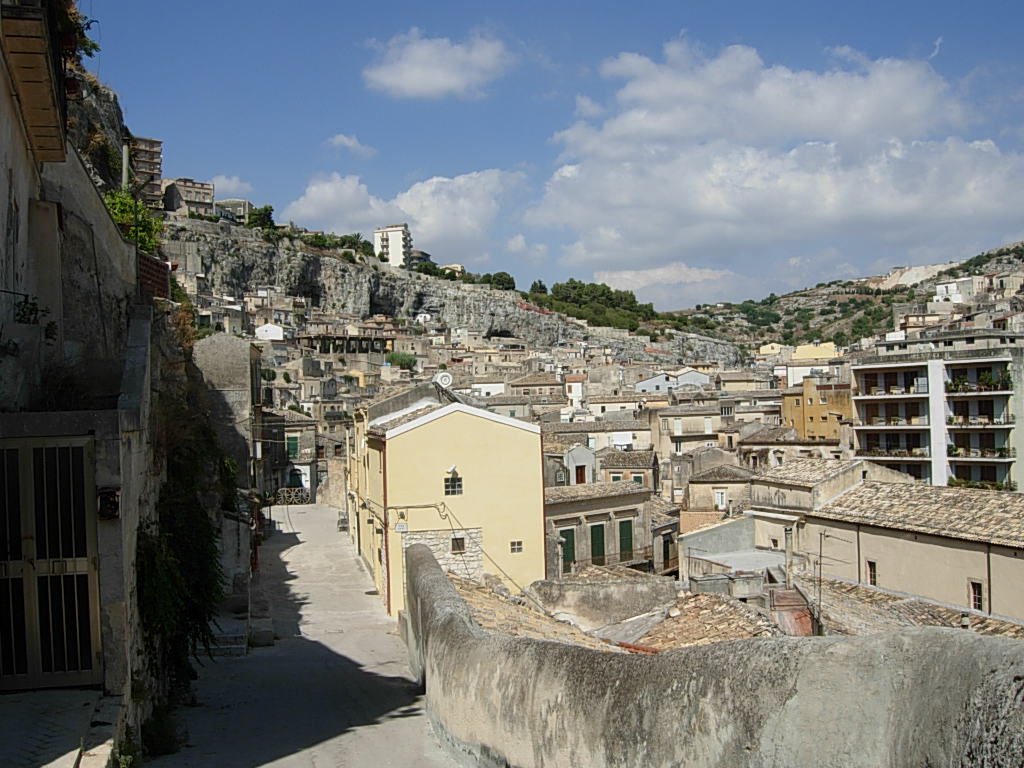 Targa casa natale Quasimodo a Modica